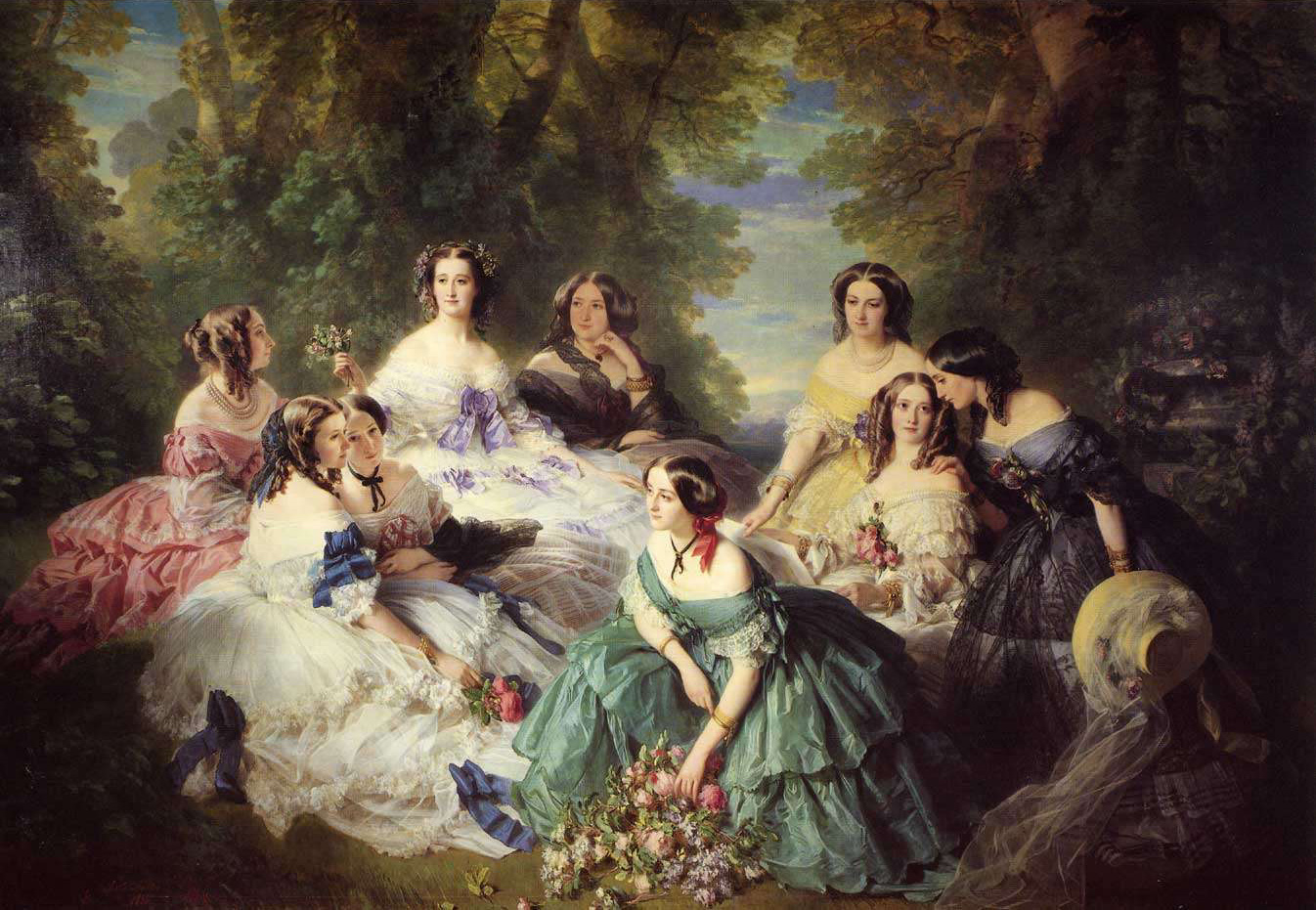 Portrait collectif avec l'impératrice Eugénie de Montijo, la baronne de Pierres, la princesse d'Essling, la vicomtesse de Lezay-Marnésia, la marquise de Montebello, la duchesse de Bassano, la baronne de Malaret, la marquise de Las Marismas et la marquise de Latour-Maubourg